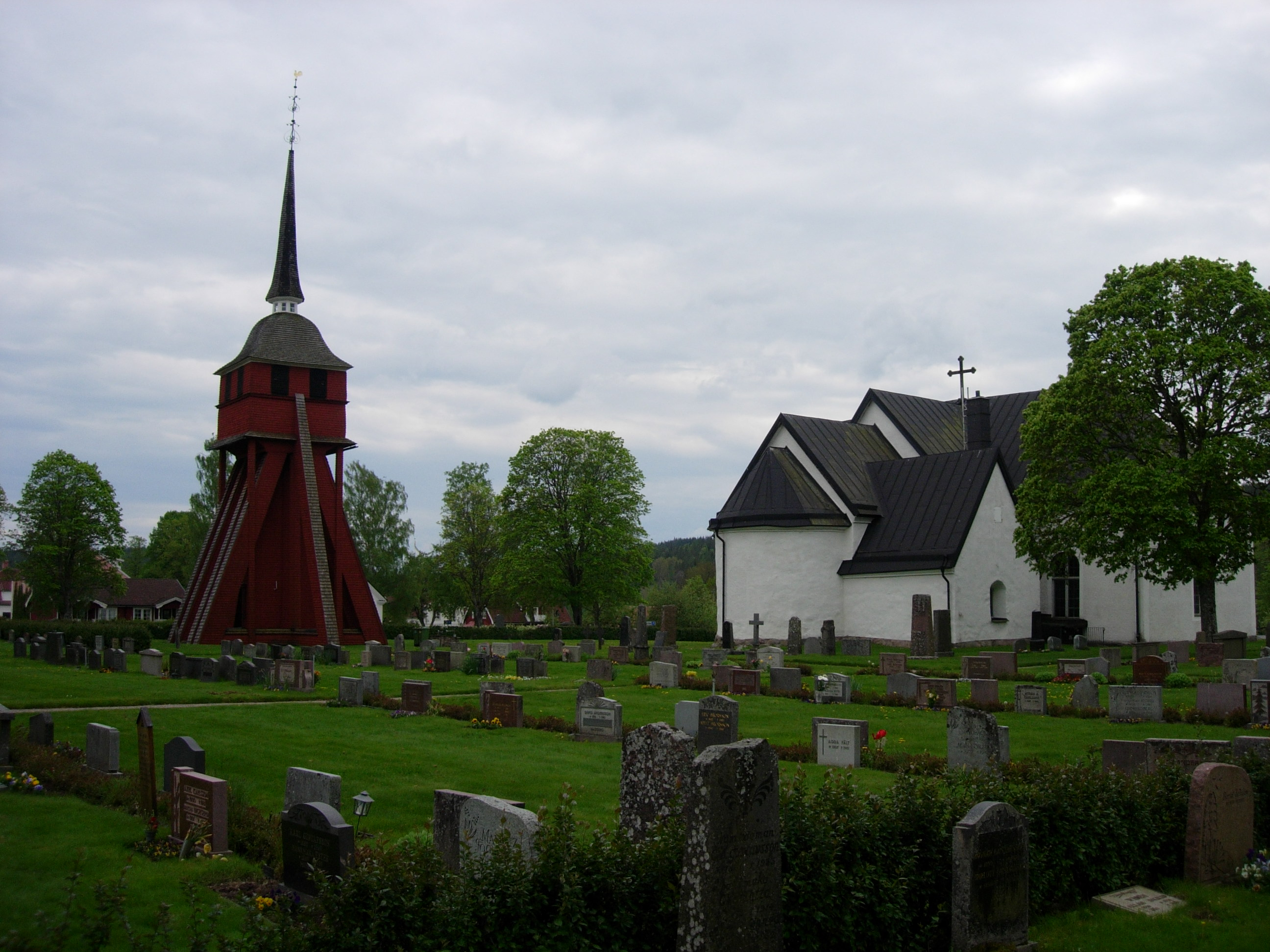 Asby church in Östergötland